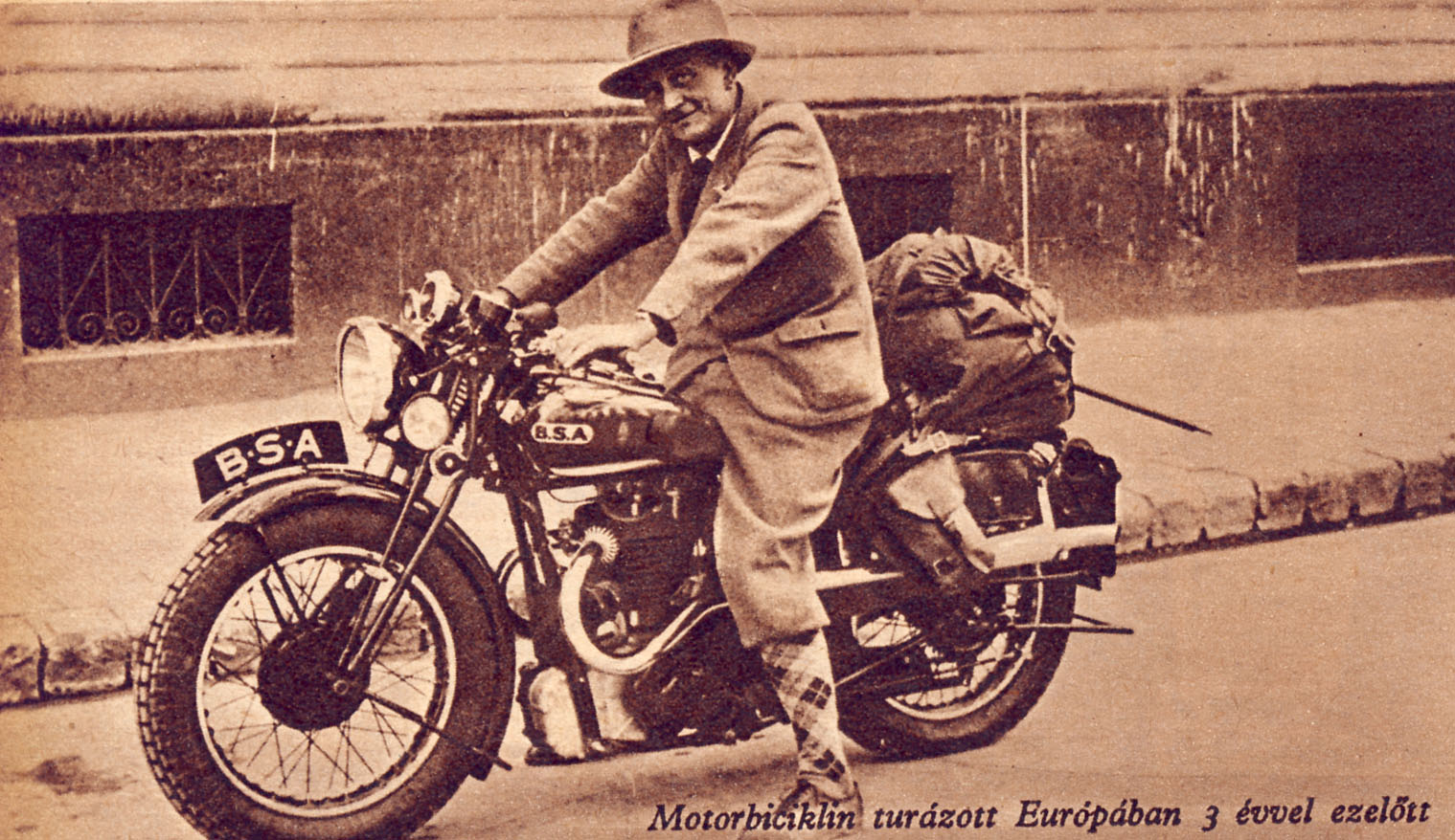 Szent-Györgyi Albert BSA J34 típusú, 499 cm3-es, kéthengeres, felülszelepelt, V-henger-elrendezésű angol motorjával, amellyel 1934-ben európai túrán vett részt.